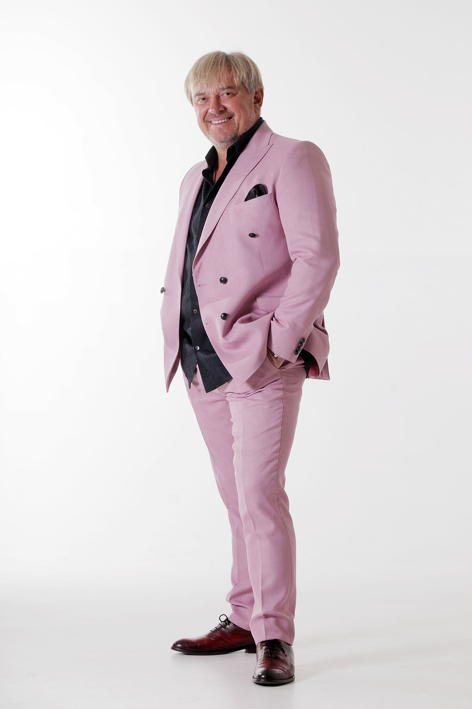 Михайло Грицкан